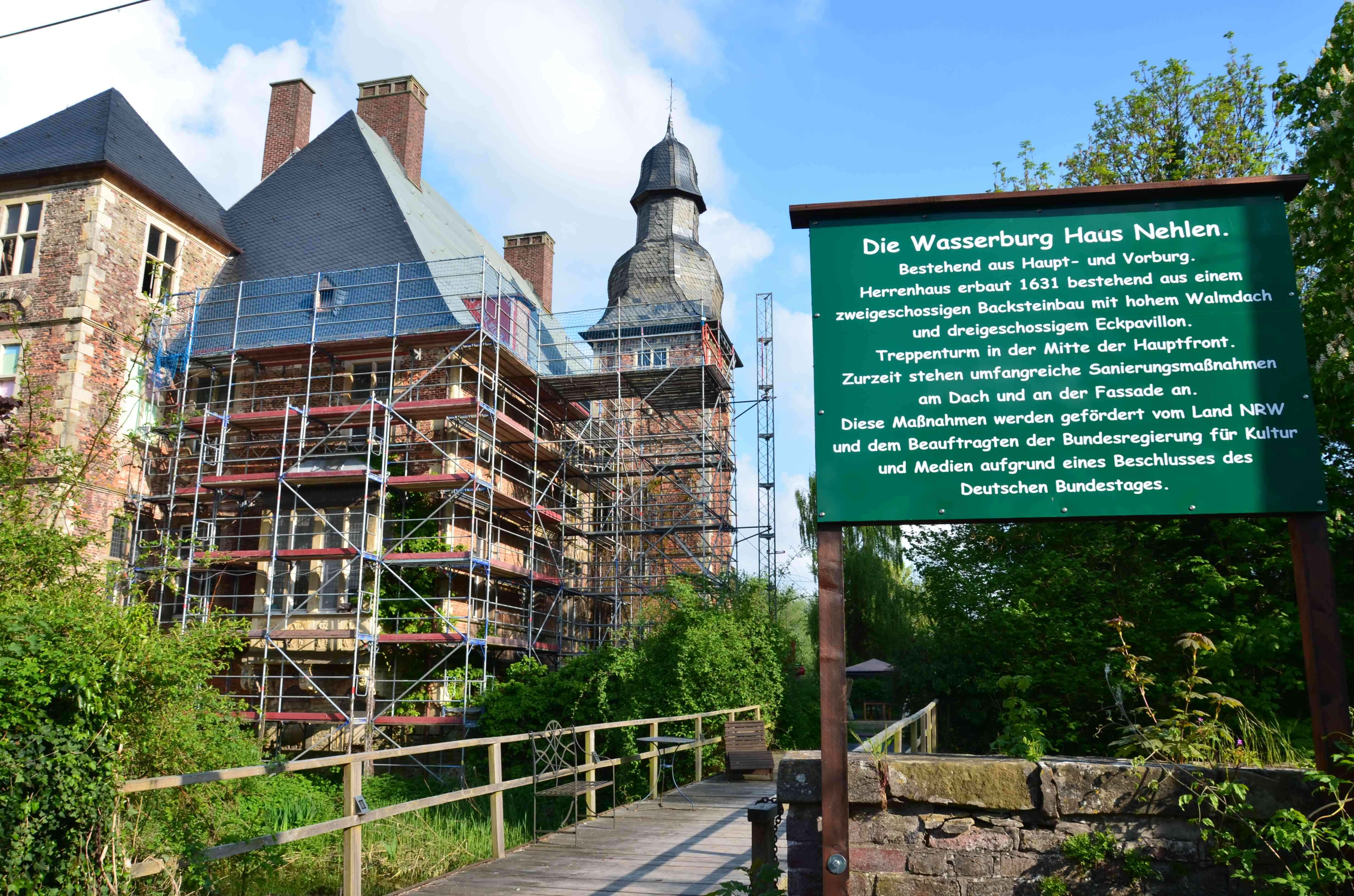 Besser bekannt als "Wasserburg Haus Nehlen", Berwicke, Herrenhaus erbaut 1631, etwas Abseits der L670 This is a photograph of an architectural monument.